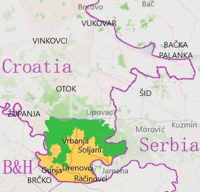 Српски (ћирилица): Микрорегија Цвелферија у Вуковарско-сремској жупанији